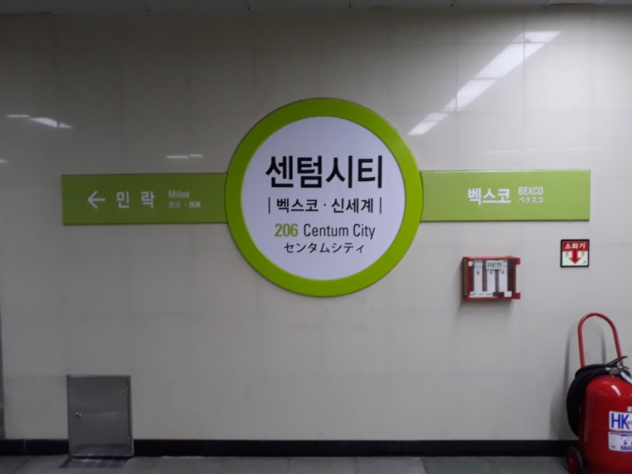 부산 도시철도 2호선 센텀시티역 양산 방면 역명판